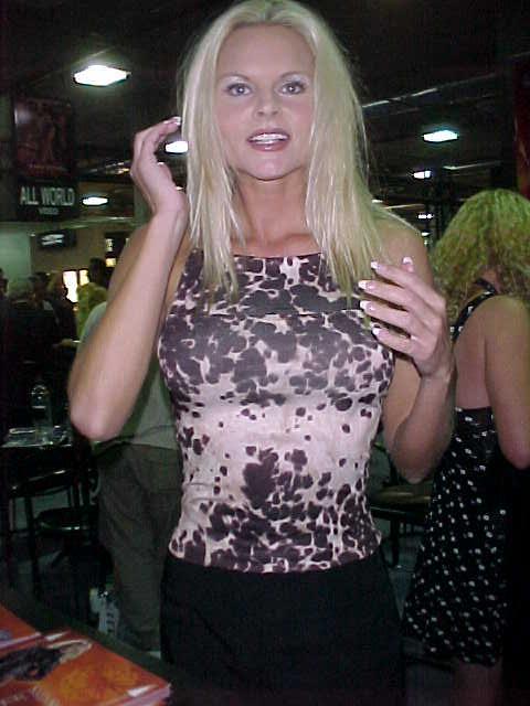 Katja Kean at CES on January 6, 2000